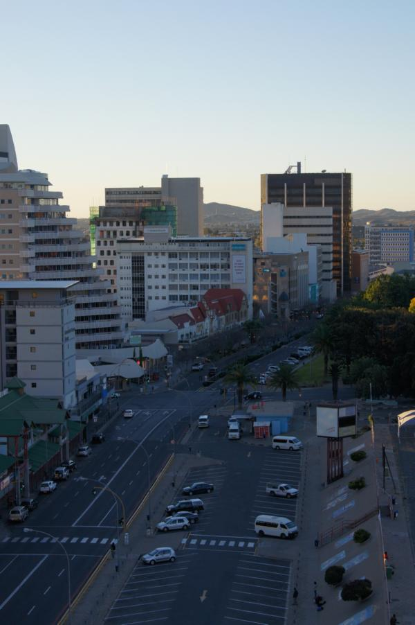 Blick auf die Independence Avenue (Windhoek) vom Hilton Windhoek Richtung Norden